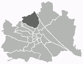 Positionskarte des 19. Wiener Gemeindebezirks Unter Verwendung einer Vorlage von Extrawurst. Public Domain.